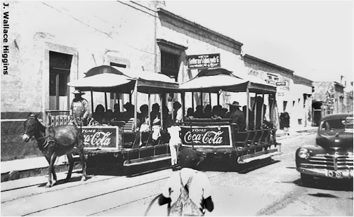 Parada de Transporte de mulas en la calle Benito Juárez en la ciudad de Celaya aproximadamente en los años 30's